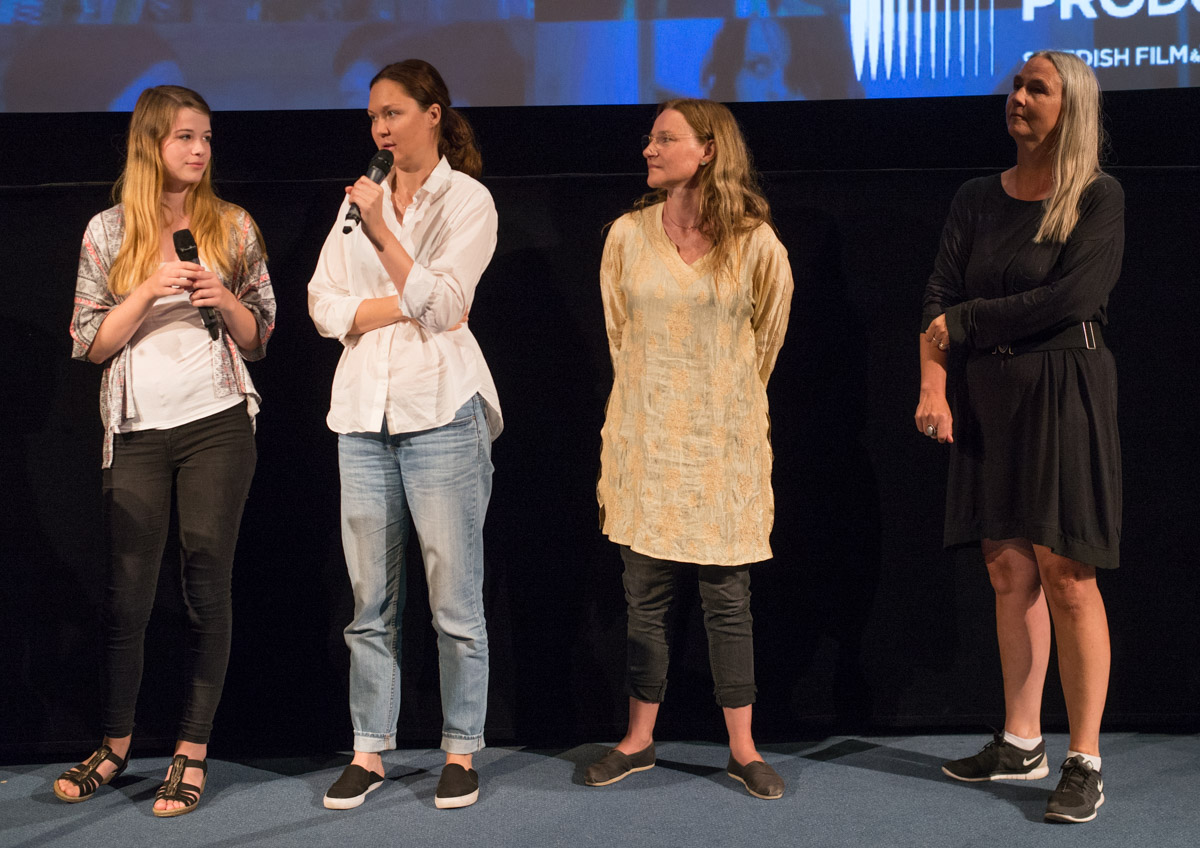 Filmen "Det borde finnas regler" presenteras i Filmhuset i Stockholm den 17 augusti 2015.